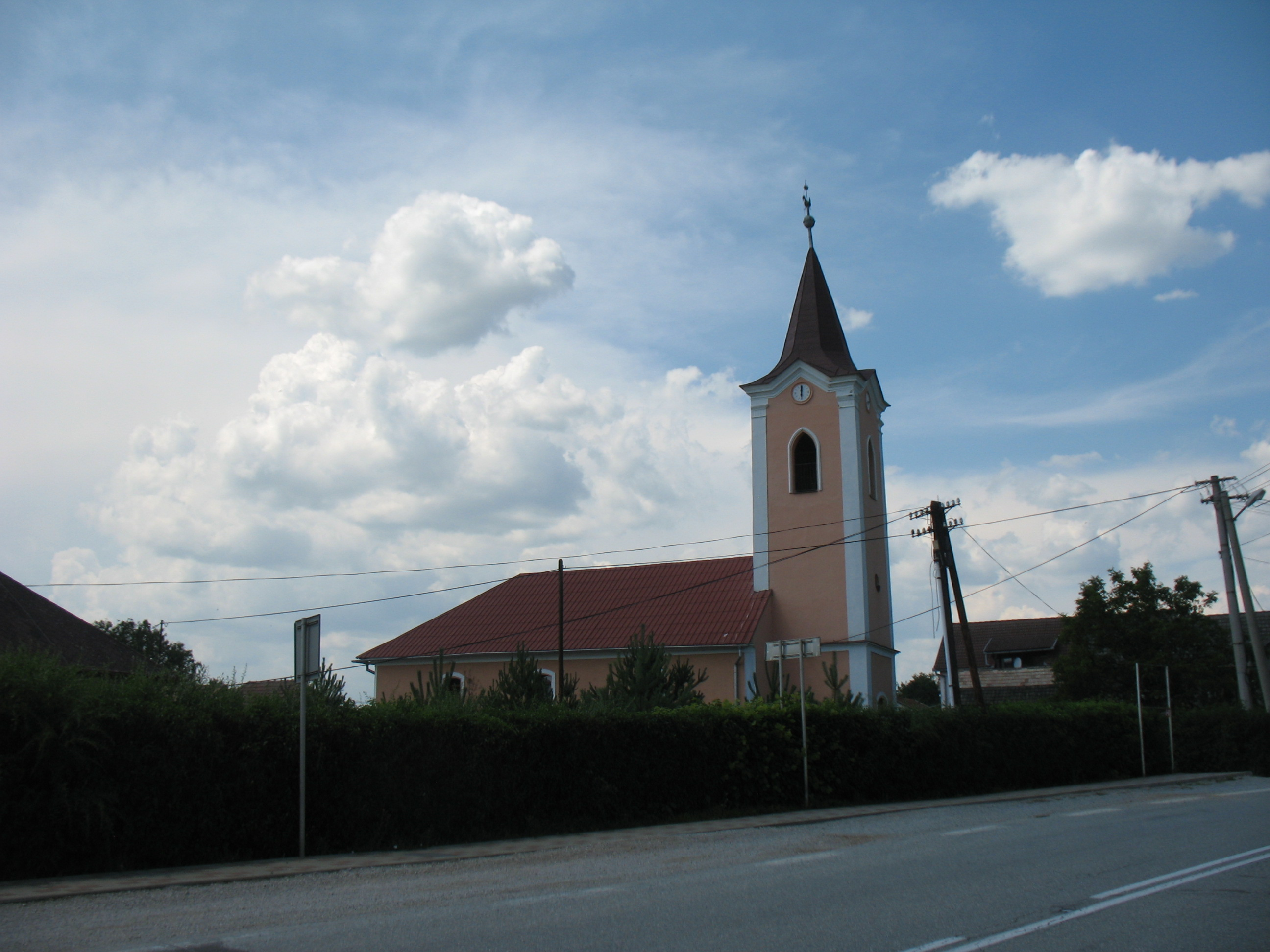 Kövecses